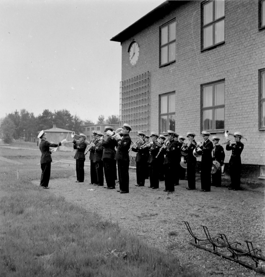 Kungl. Svea flygflottiljs musikkår spelar under korum vid invigning av minnessten vid Kungl. Roslagens flygflottilj.